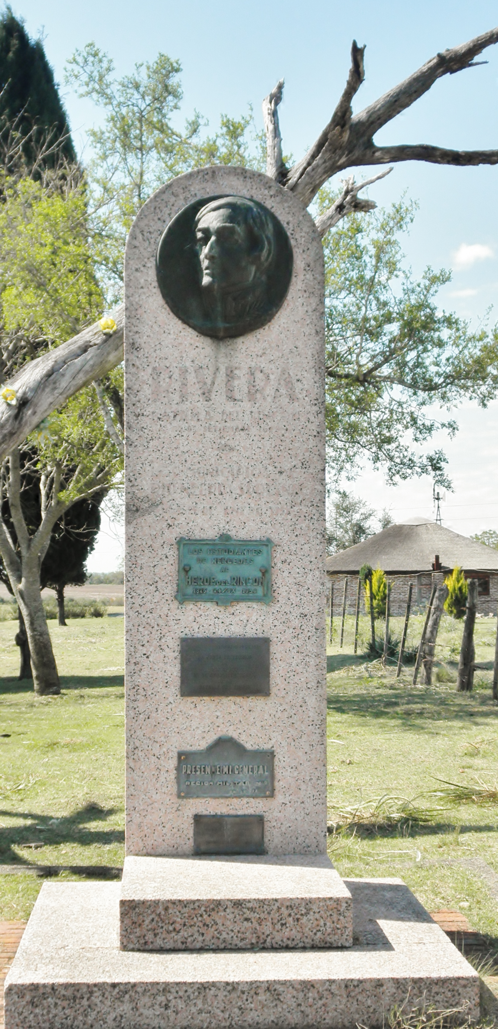 A la Batalla del Rincón (monolito). Ubicada en el departamento de Río Negro